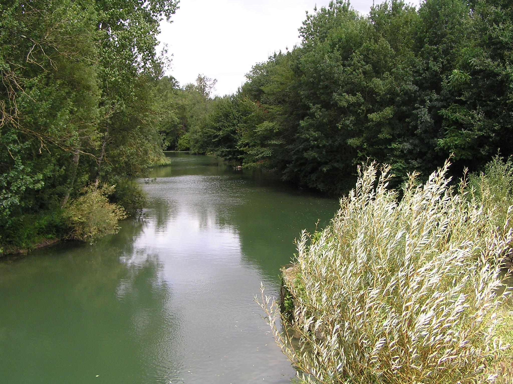 la Charente à Vars, Charente, France